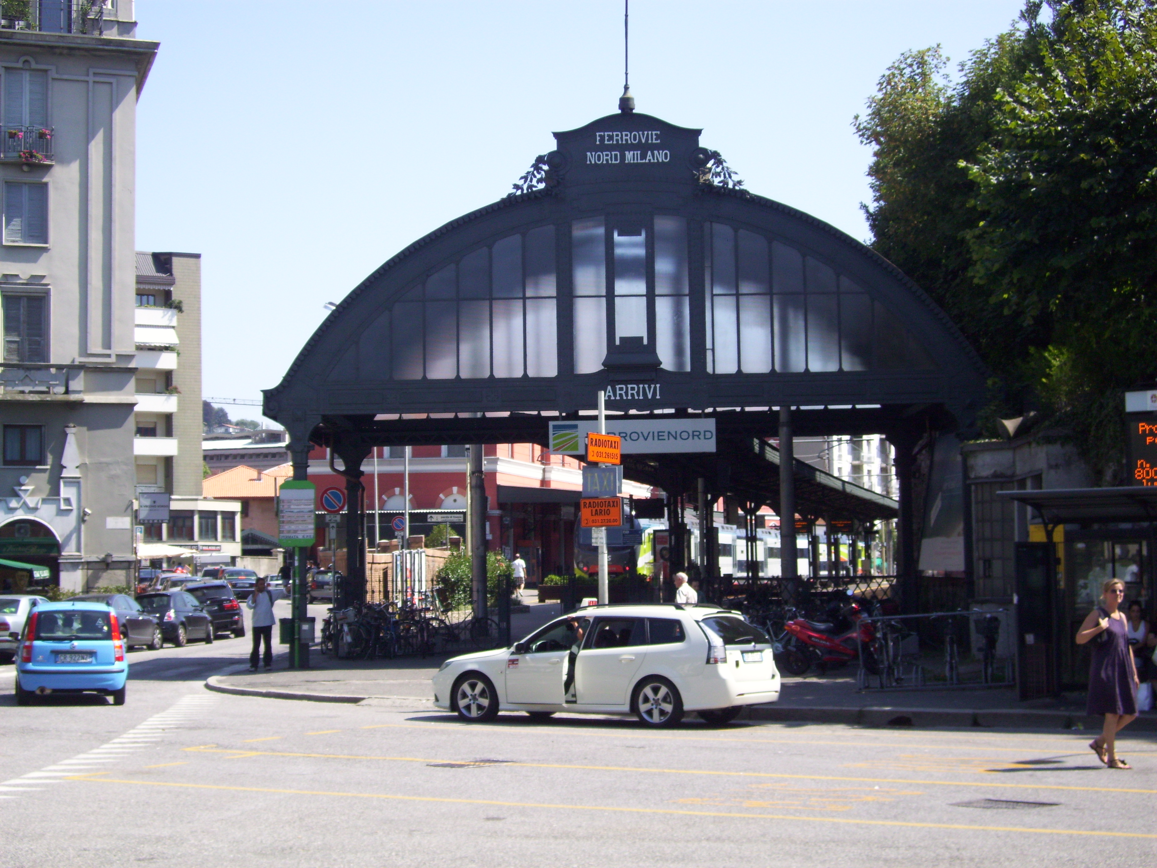 la tettoia della stazione Como Lago delle Ferrovie Nord Milano